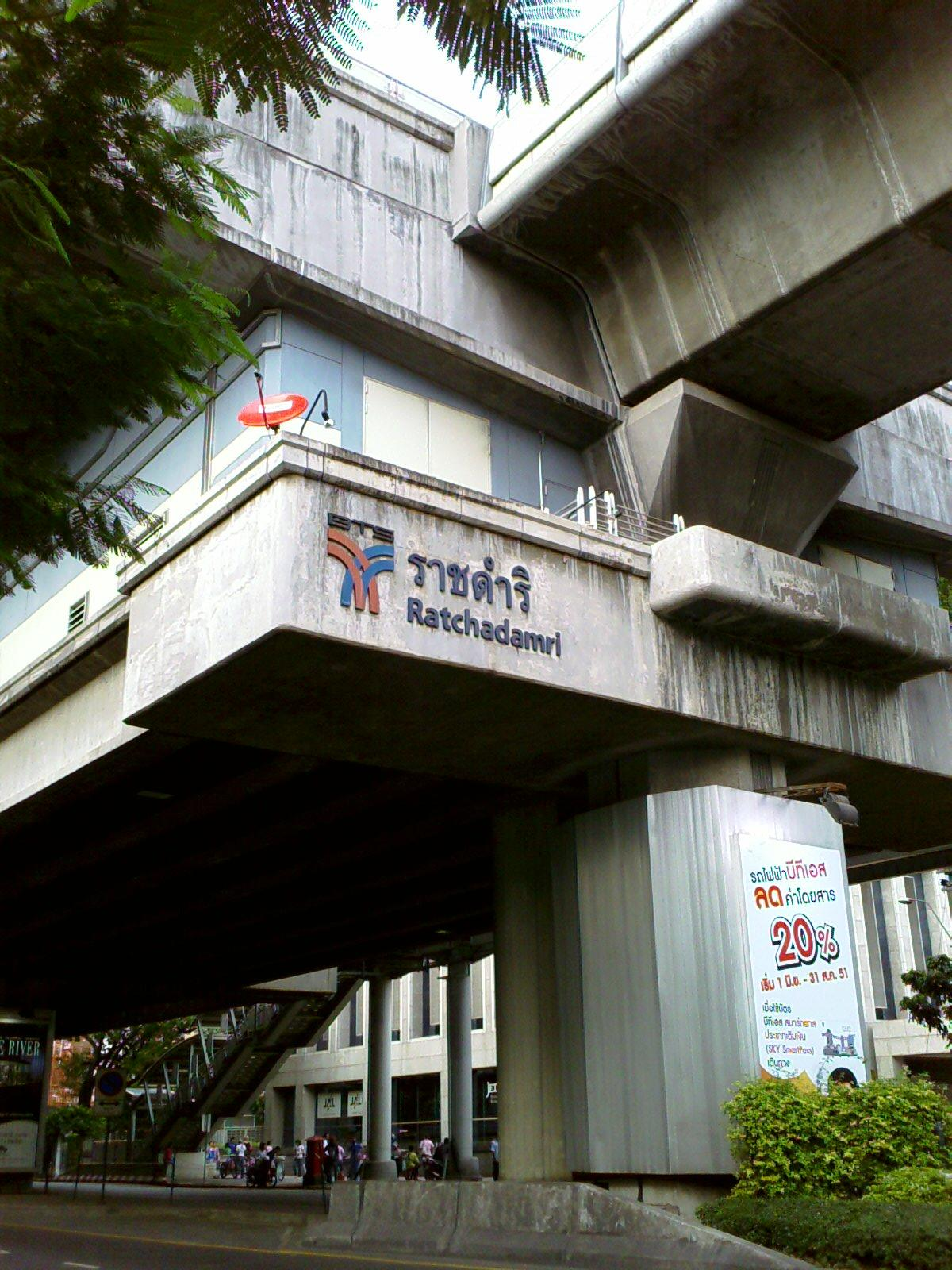 DStv dish at Ratchadamri Station สถานีรถไฟฟ้าเอาจาน DStv ไว้ทำอะไร?